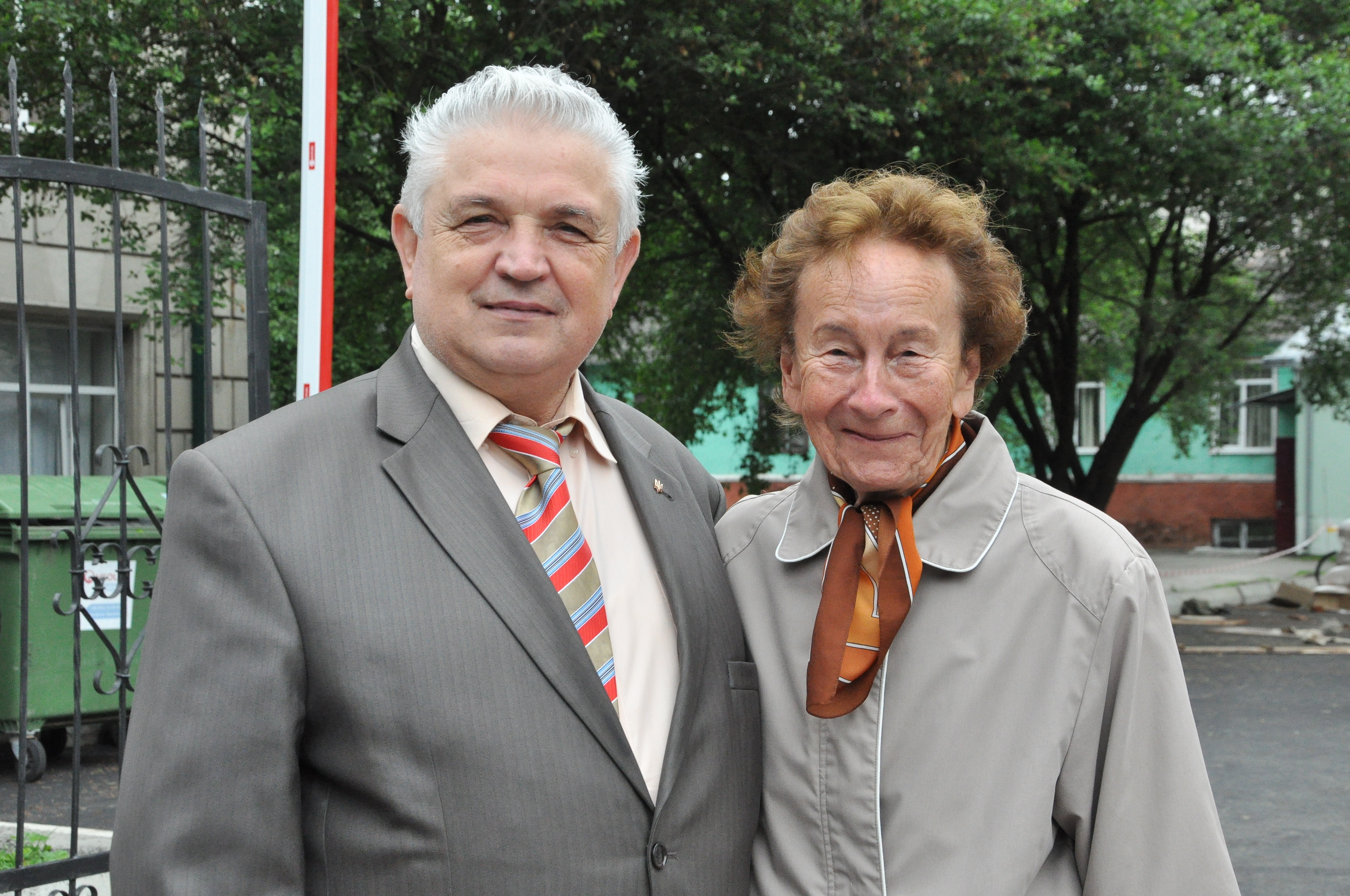 Українські вчені в галузі медицини, доктори медичних наук, професори Микола Швед і Марія Савула.